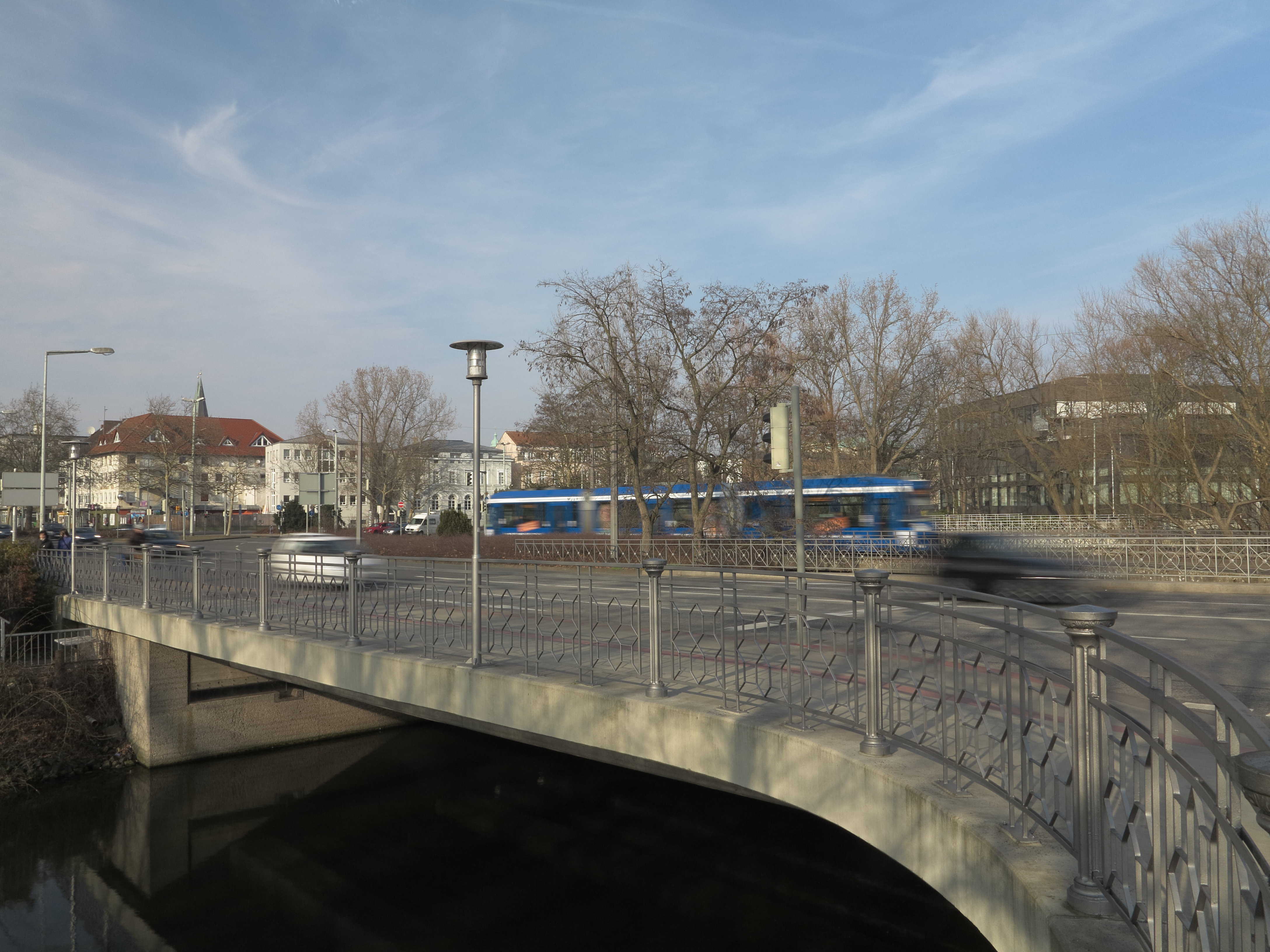 Die Westbrücke der Gieselerbrücken am braunschweiger Europaplatz